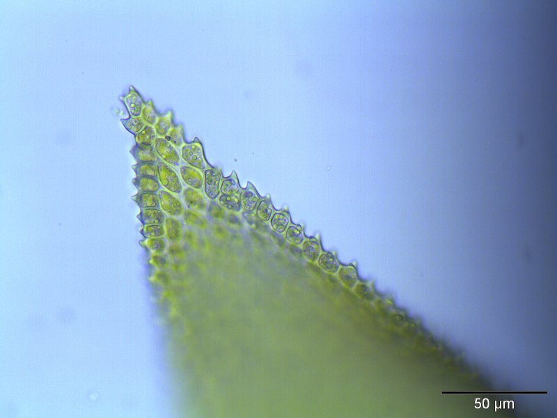 Haarspitzen-Thujamoos (Thuidium philibertii), Blattspitze, Vergrößerung: 400x, Achtung! oberste 3 Endzellen sind wohl abgebrochen